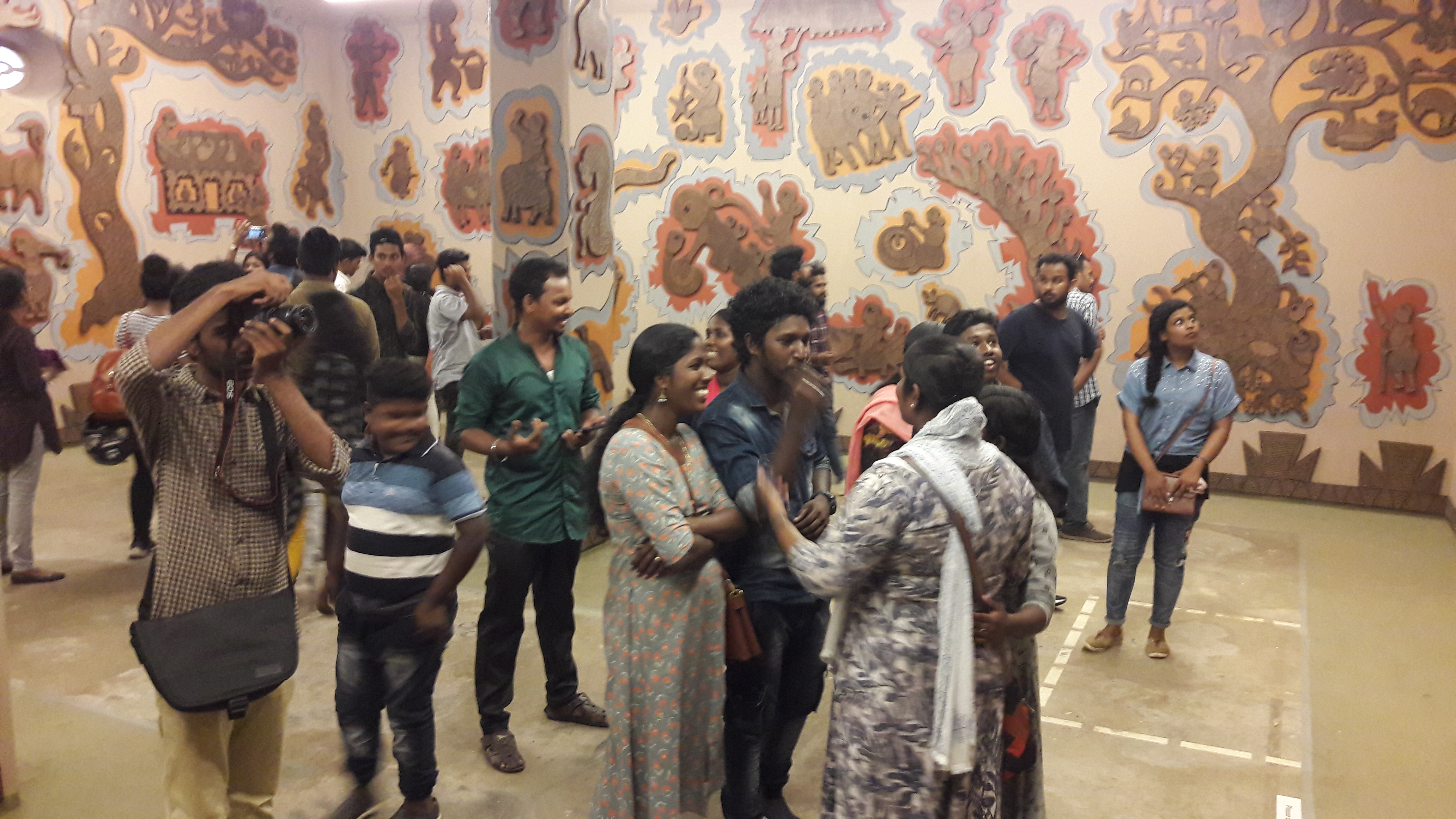 കൊച്ചി മുസിരിസ് ബിനാലെ നാലാം പതിപ്പിൽ വ്യോം പ്രോജക്റ്റ് കാണുന്നവർ